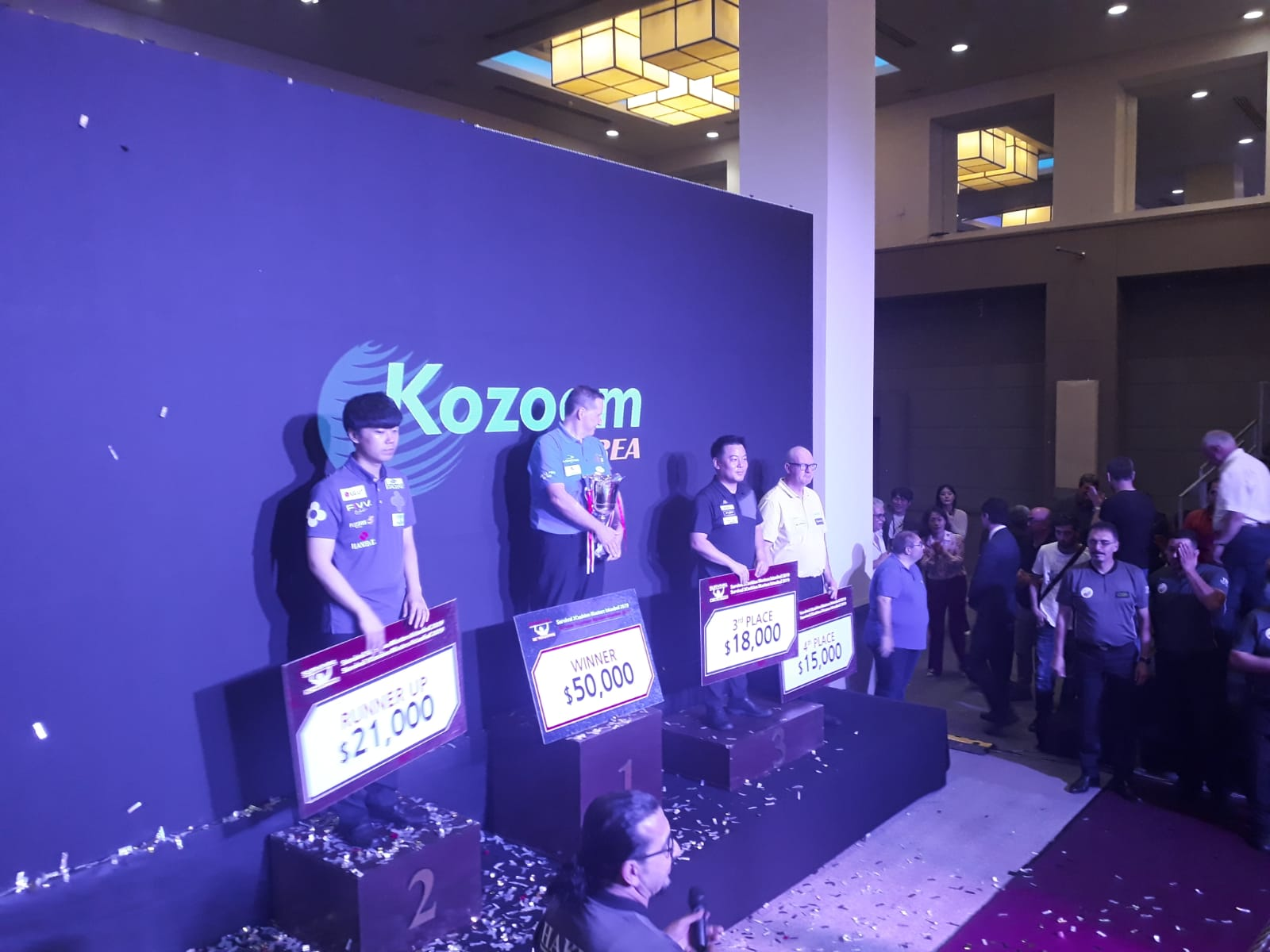 see file name